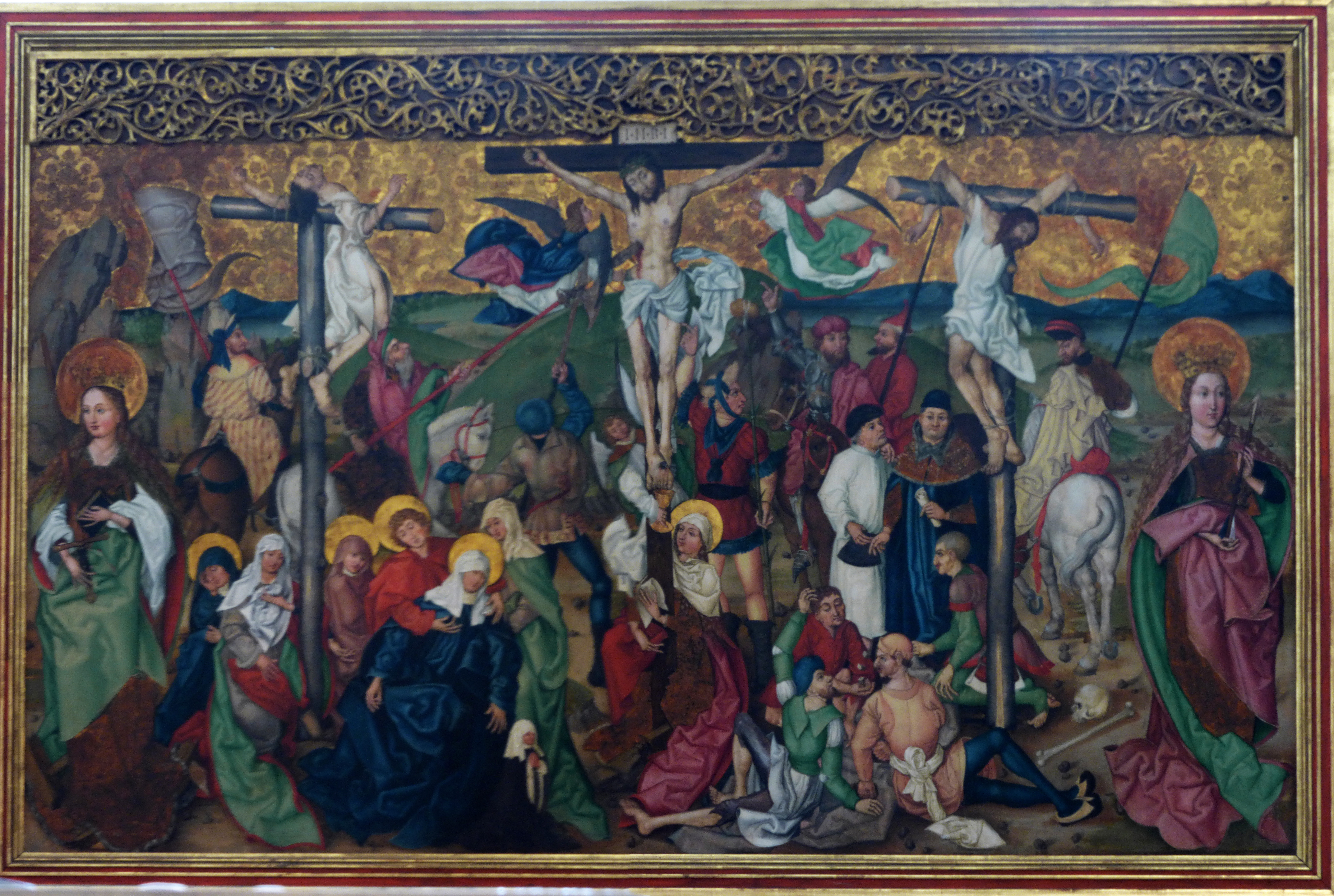 Retable de l'église de Buhl, Haut-Rhin, partie centrale